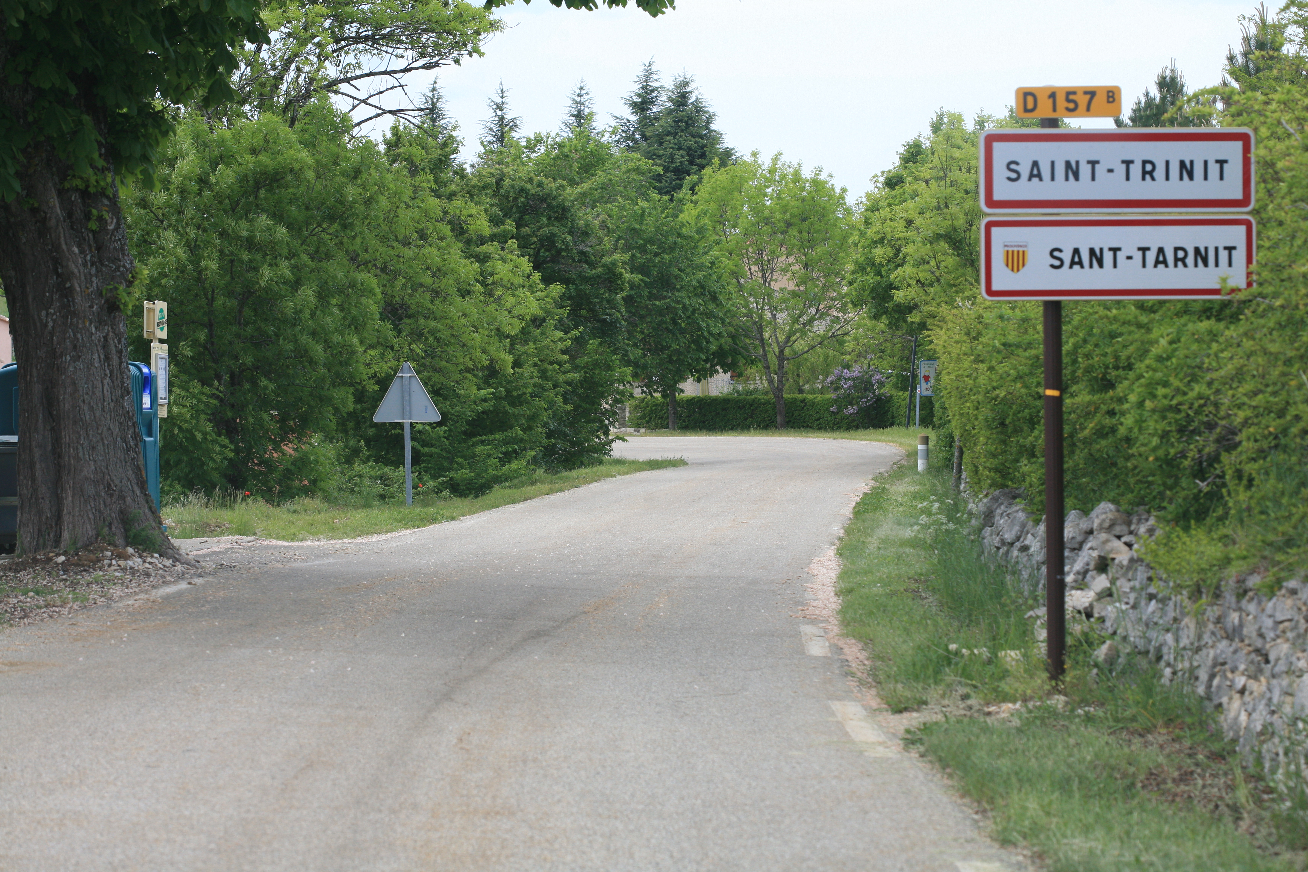 Arrivée à Saint-Trinit (Vaucluse)